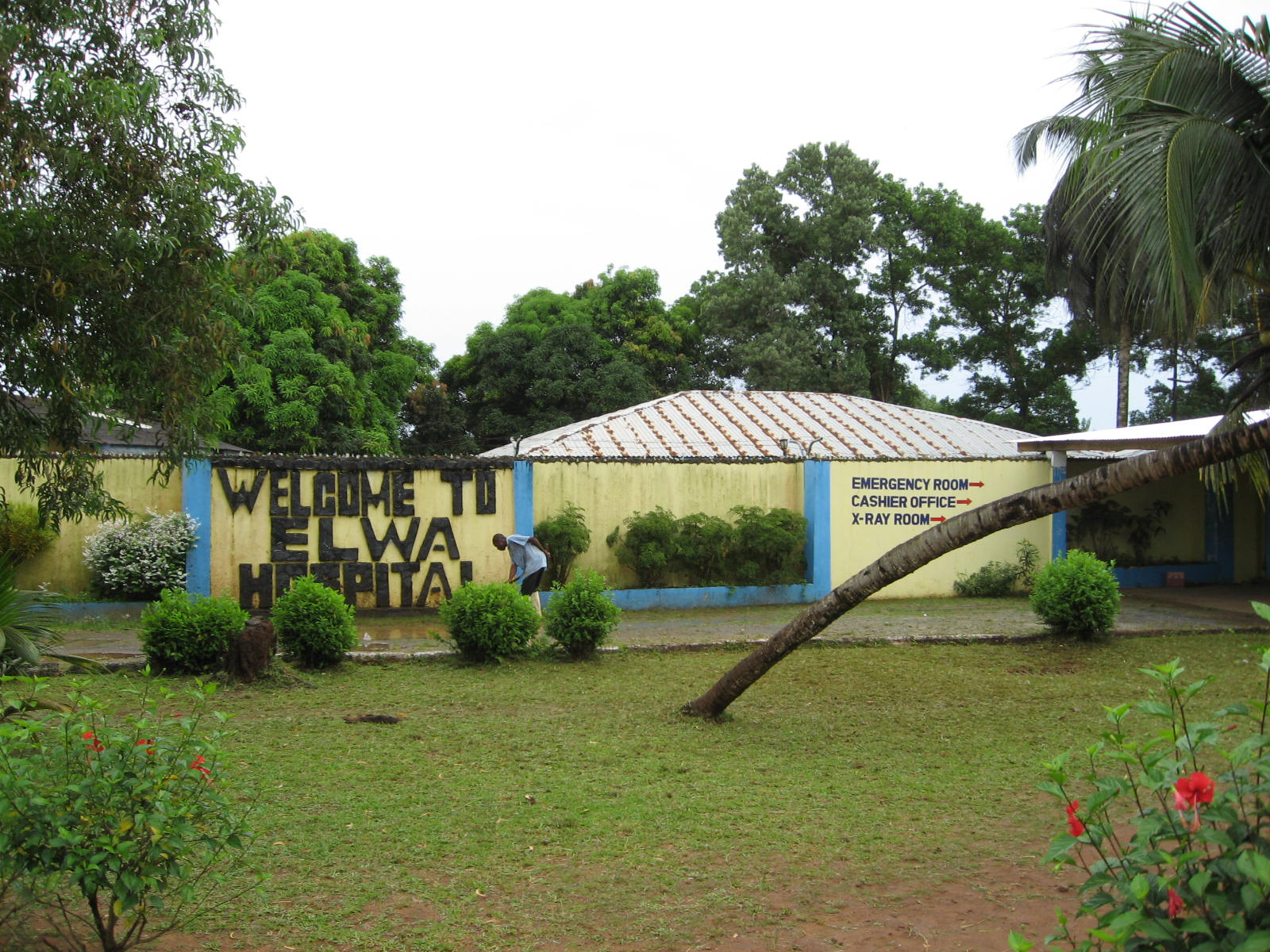 elwa